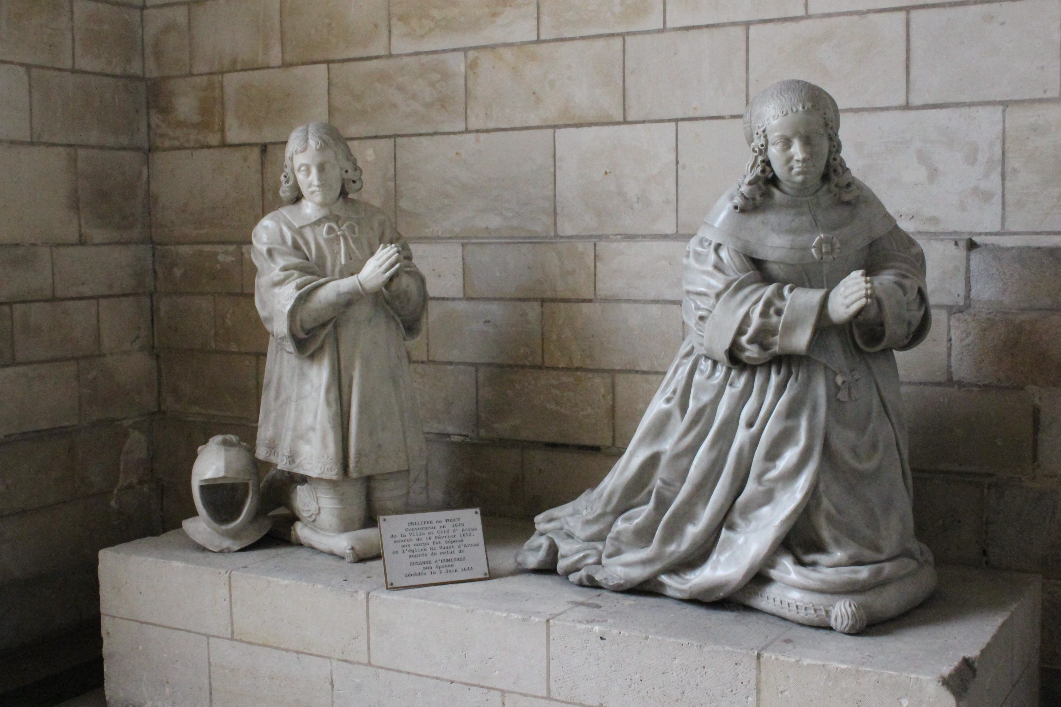 Arras (62) La cathédrale Ancienne chapelle Saint Charles Philippe de Torcy, gouverneur d'Arras après le retour d'Arras à la France au XVIIe siècle, et sa femme, Suzanne d'Humières